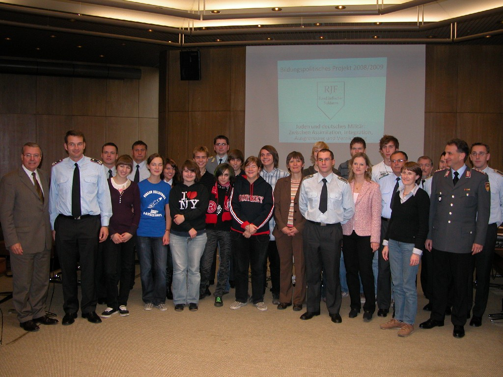 Gruppenbild mit Schülern des Anno-Gymnasiums aus Siegburg während des bundesweiten Bildungsprojektes "Juden und deutsches Militär - Zwischen Vernichtung, Ausgrenzung und Assimilation" des Bundes jüdischer Soldaten 2008/2009. In das Bildungsprojekt waren jüdische und nicht-jüdische Schulen, Bundeswehrdienststellen und Forschungseinrichtungen eingebunden. Einzelprojekte zur Kunst-, Kultur-, Religionsgeschichte, sozialwissenschaftliche Untersuchungen zur Einstellung jüdischer Heranwachsender zur Heimat und Militär sowie historische Untersuchungen und religionsgesetzliche Analysen wurden am Ende präsentiert.